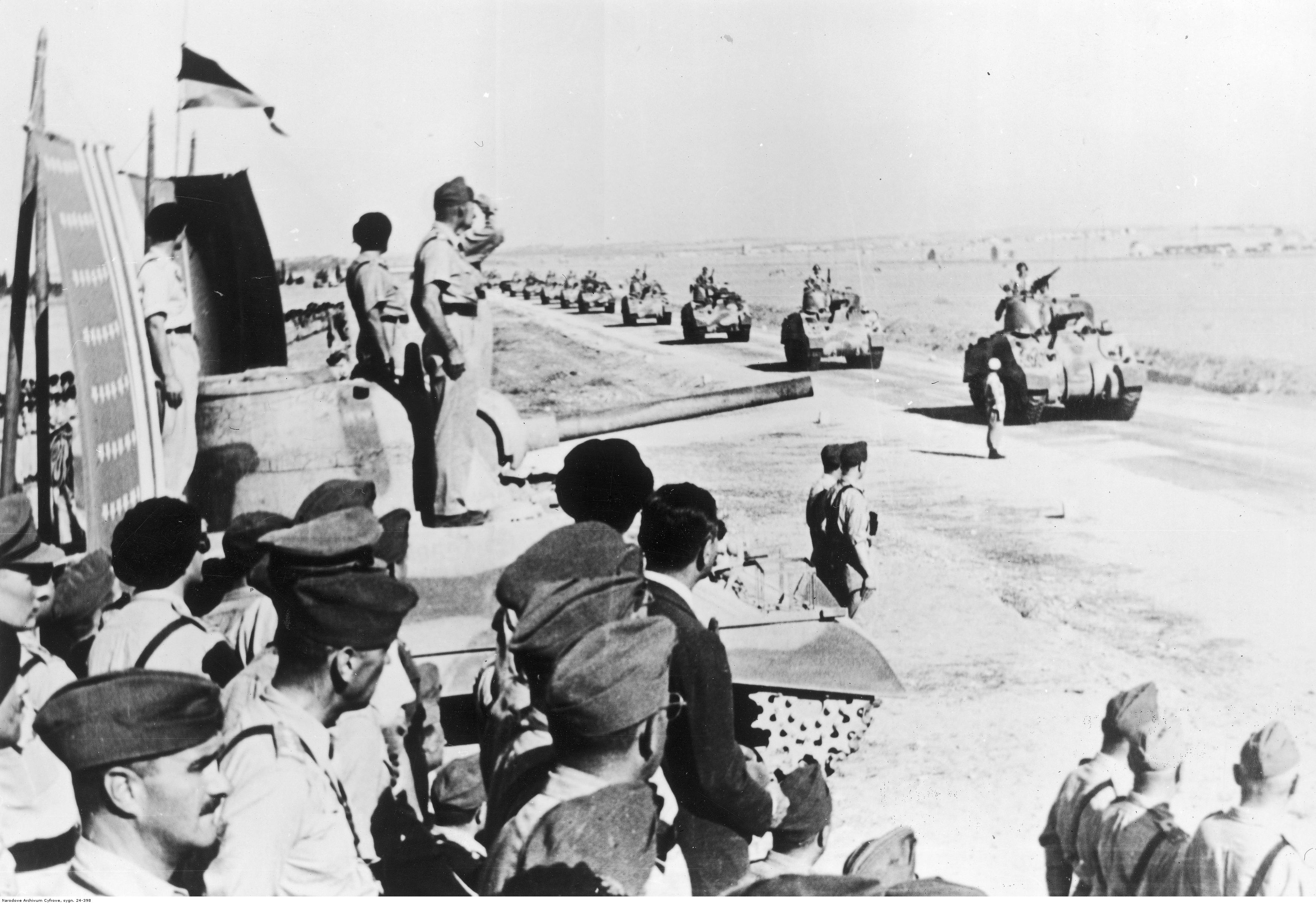 Armia Polska na Bliskim Wschodzie. Defilada Samodzielnej 2 Brygady Pancernej przed gen. Kazimierzem Sosnkowskim (salutuje) w Hill 69 koło Gazy. Widoczne czołgi Sherman M4. Archiwum Fotograficzne Tadeusza Szumańskiego. Sygnatura: 24-398